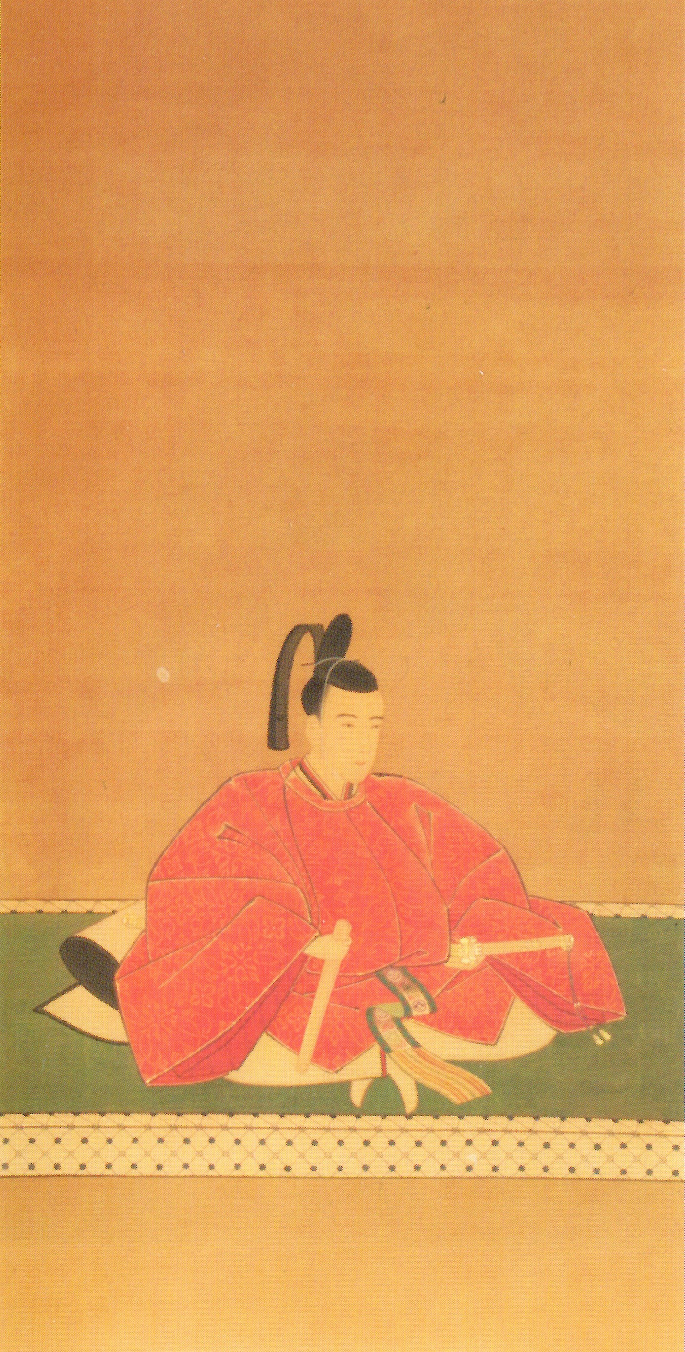 本多政和の肖像。